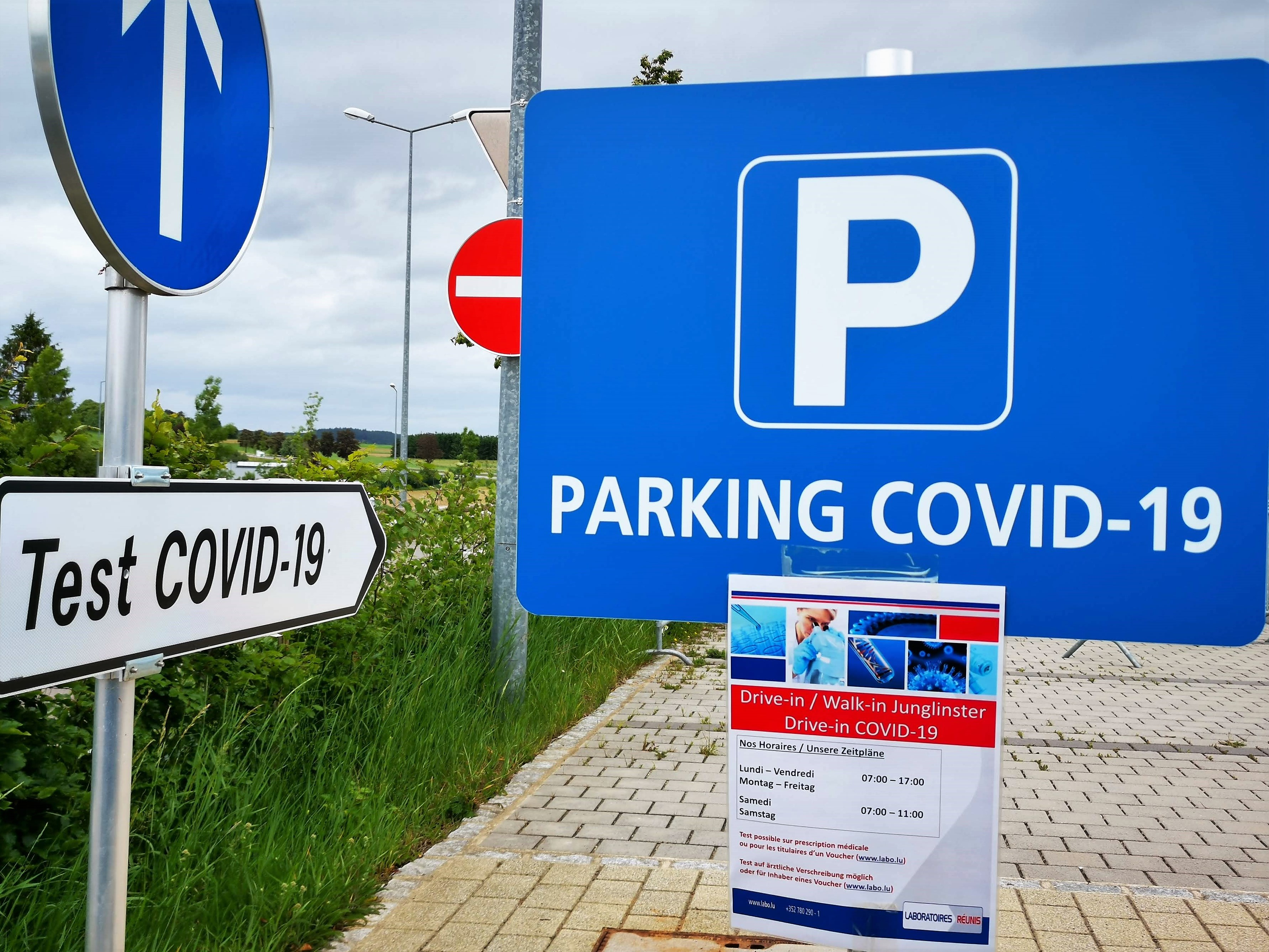 Junglinster. Signalisation station de test Covid-19.